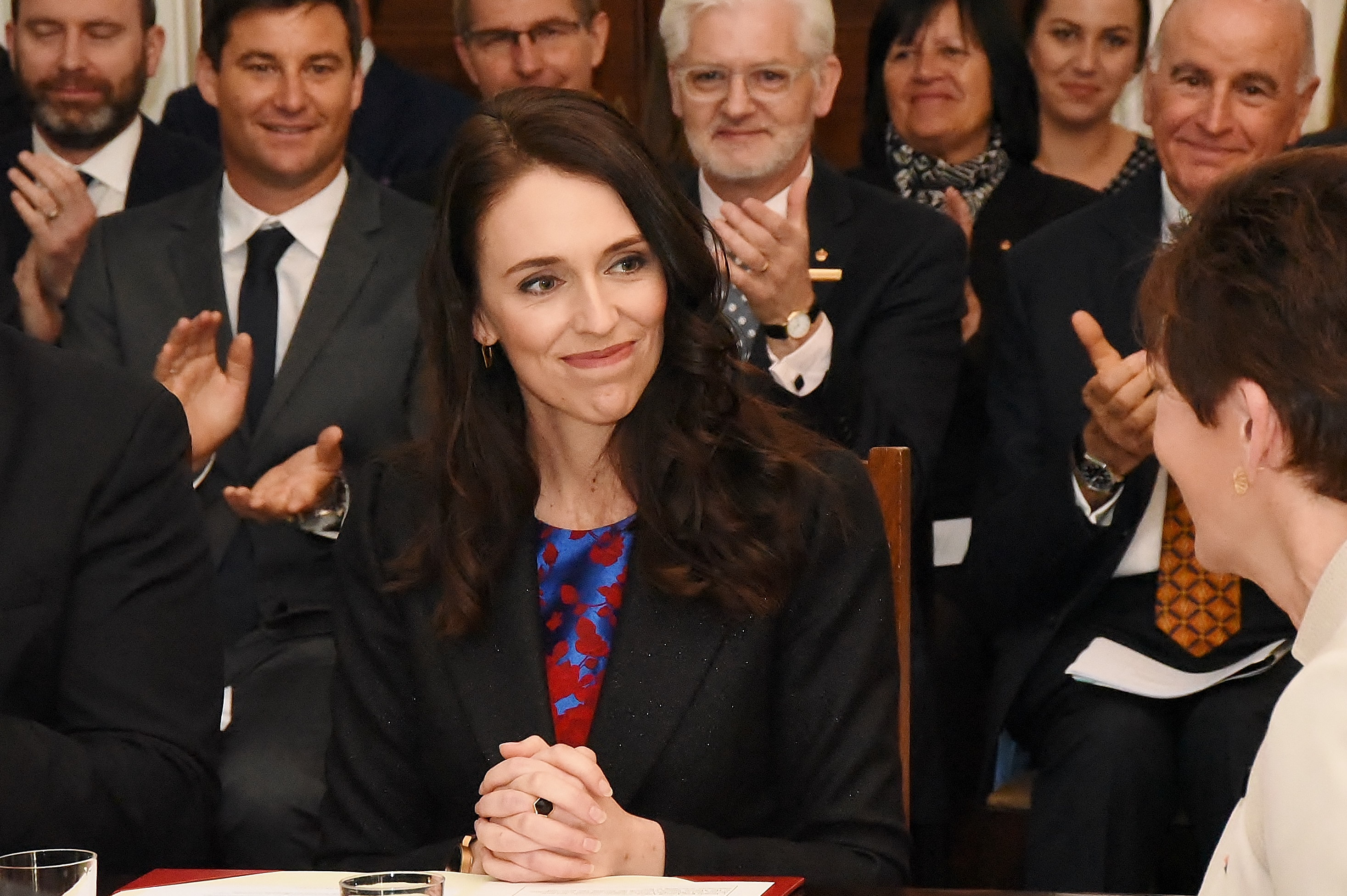 PM-designate Jacinda Ardern before the Swearing-in